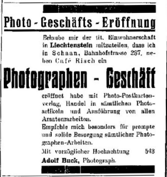 Werbeanzeige zur Eröffnung des Fotogeschäfts des Fotografen Adolf Buck in Schaan, Liechtenstein, veröffentlicht in der Zeitung Liechtensteiner Nachrichten, Ausgabe Nr. 49 vom 30. April 1932